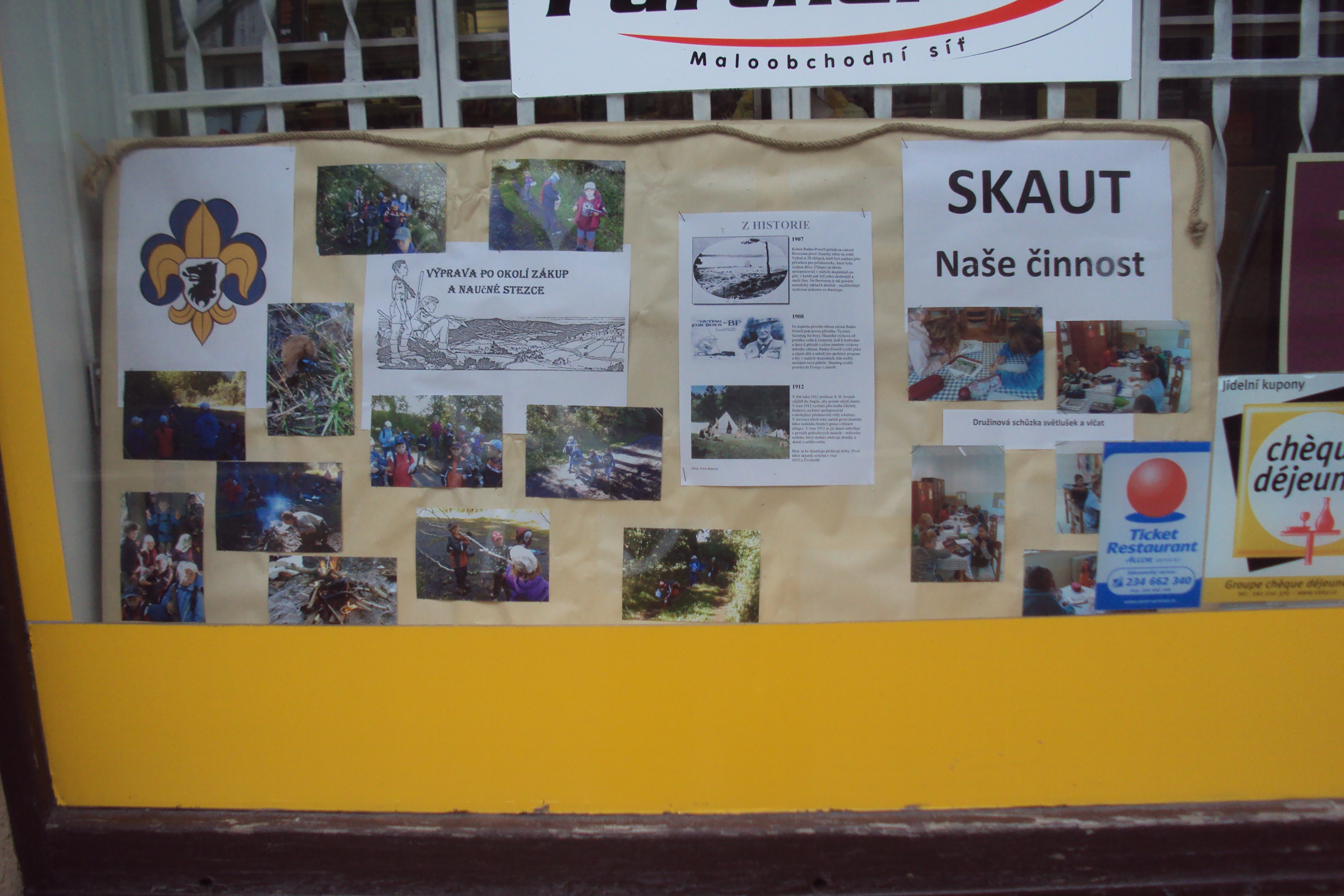 Nová nástěnka skautů ve výloze obchodu v Borské ulici